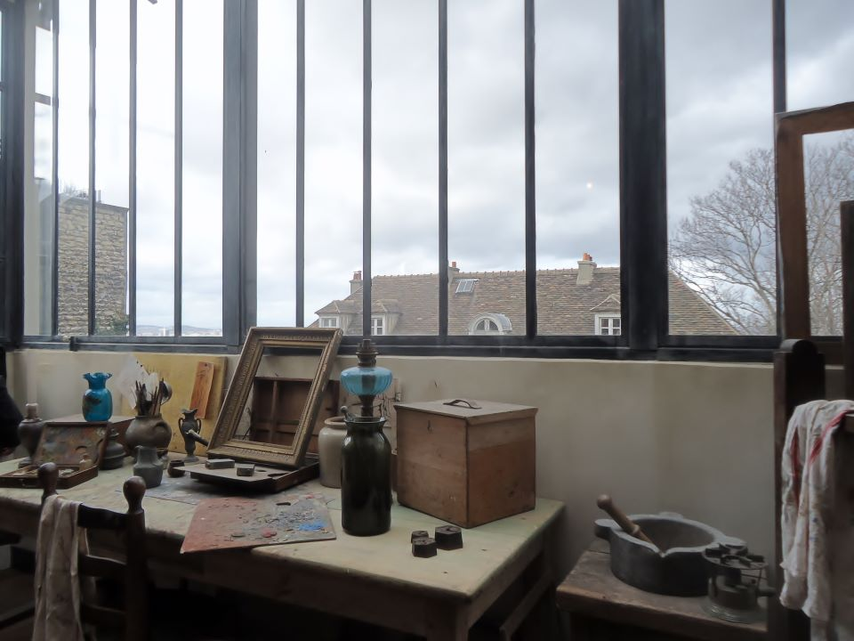 Montmartre Atelier-appartement 2